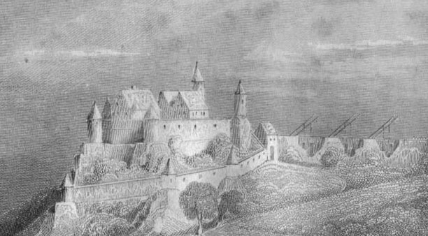 Auuschnitt aus Stahlstich "Helfenstein und die befestigte Stadt Geislingen"